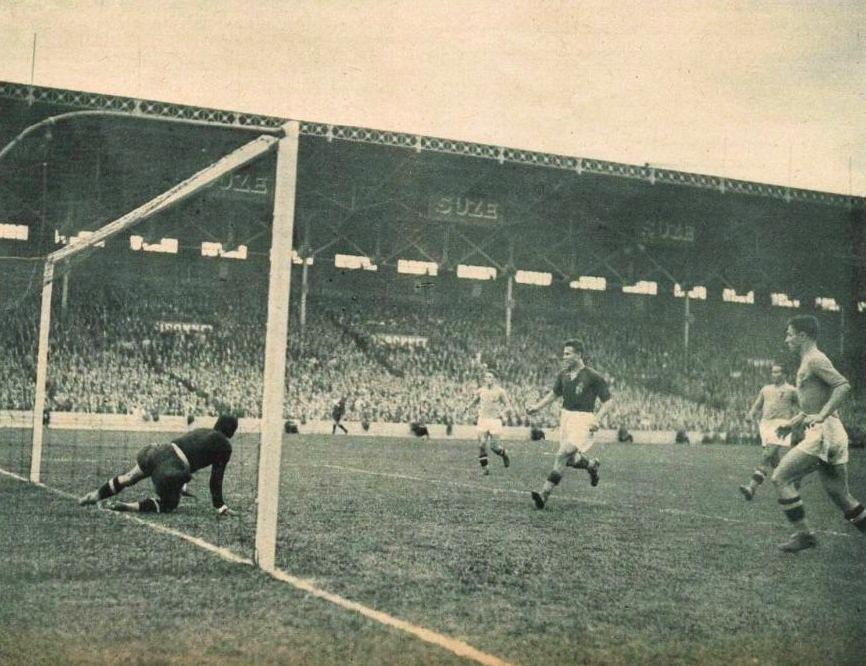 Finale de la Coupe du monde 1938 à Colombes (France), Sarosi marque le deuxième but de la Hongrie.